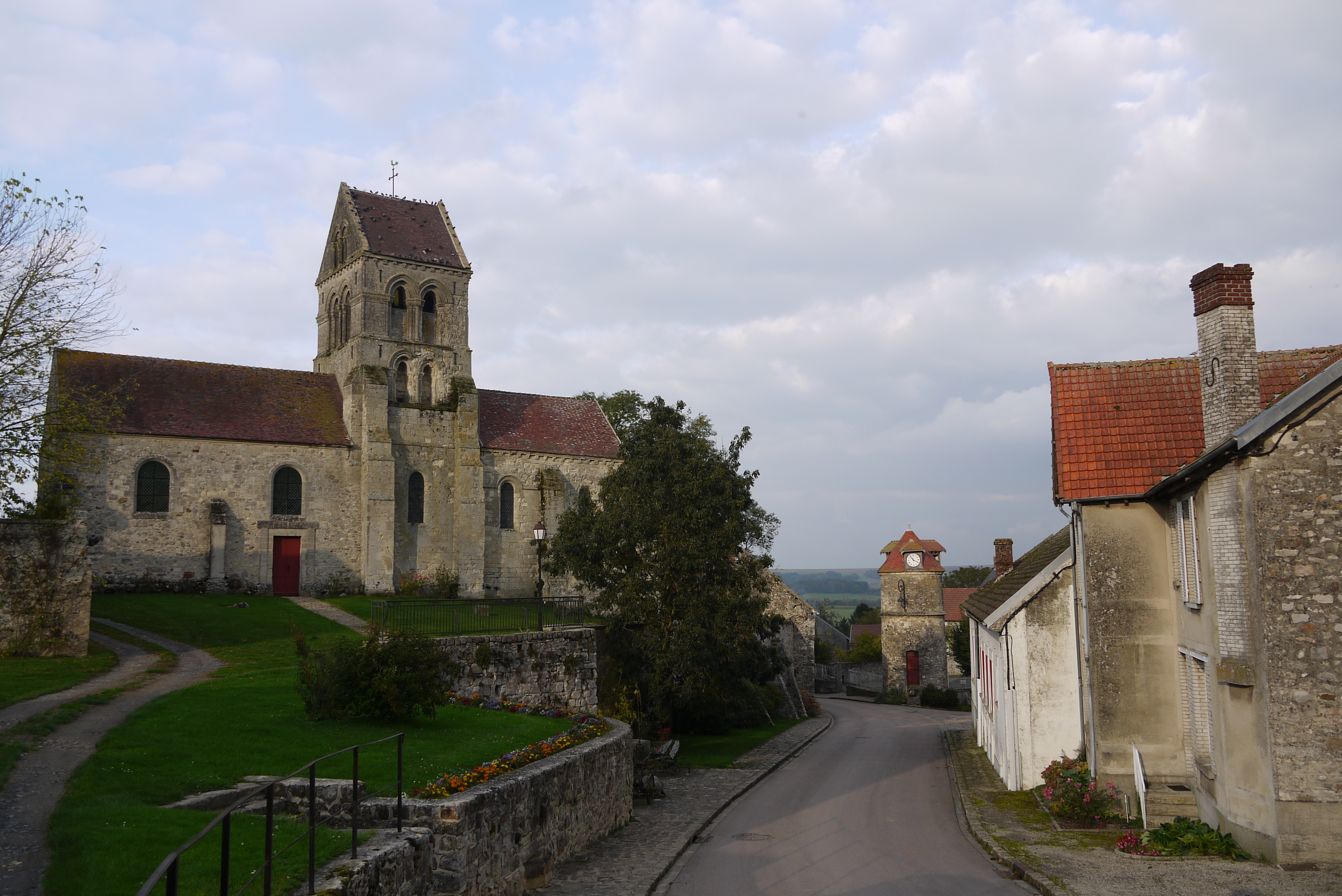 Église Sainte-Geneviève de Marizy-Sainte-Geneviève